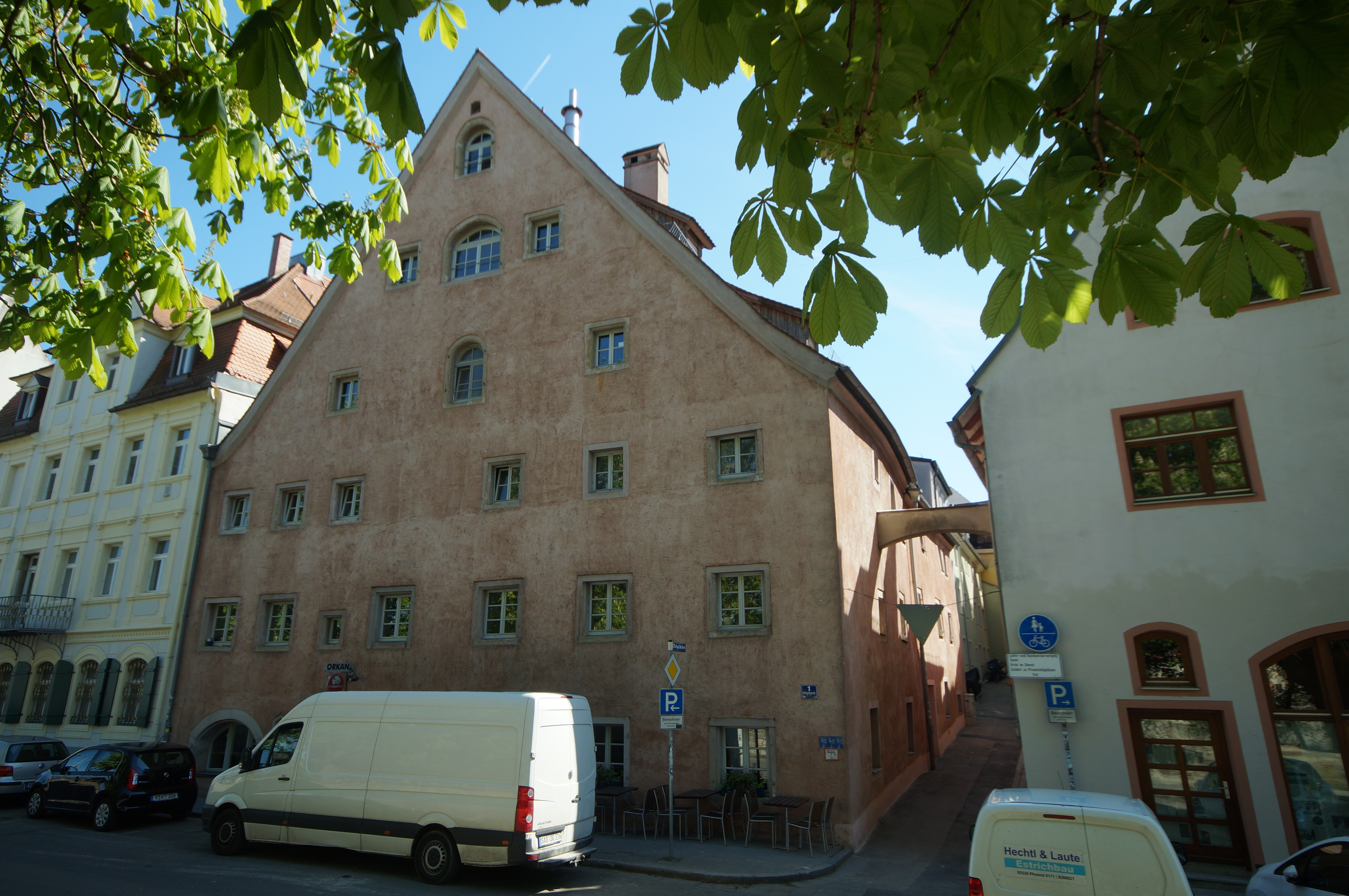 Ehemaliges Fischerhaus, später Brauerei-Lagerhaus, dreigeschossiger und giebelständiger Steilsatteldachbau mit Ladeluken und rückseitigem Brauhaus, wohl 16. Jahrhundert, Umbauten 18. Jahrhundert, innen modern verändert